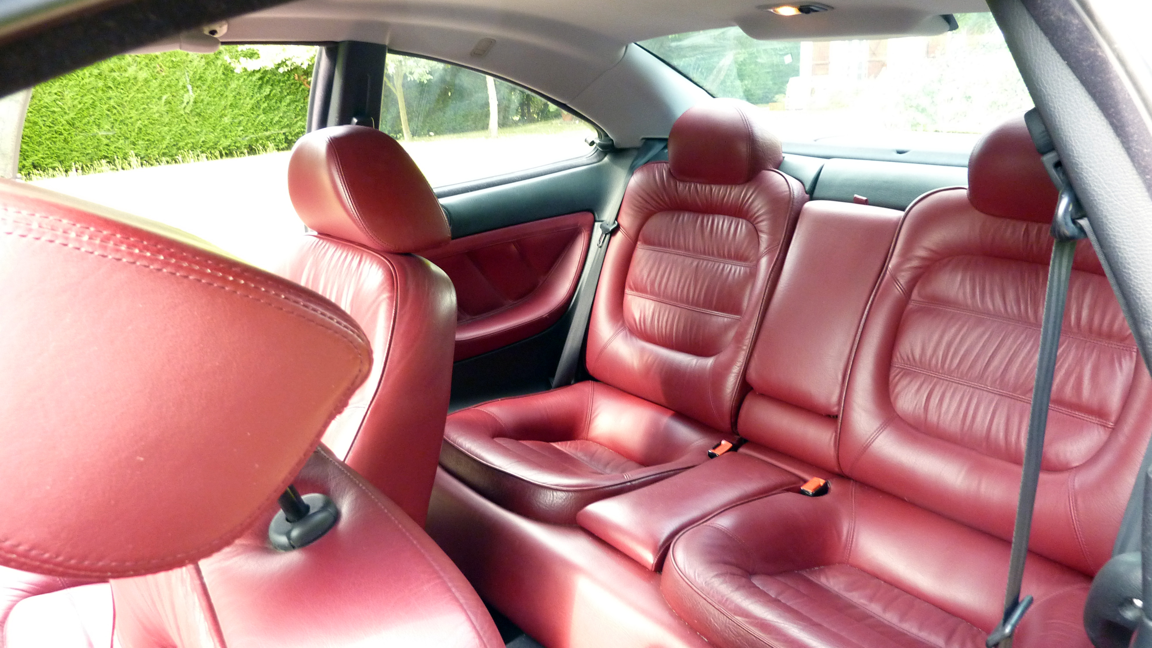 Intérieur cuir Amarante du Peugeot Coupé 406.